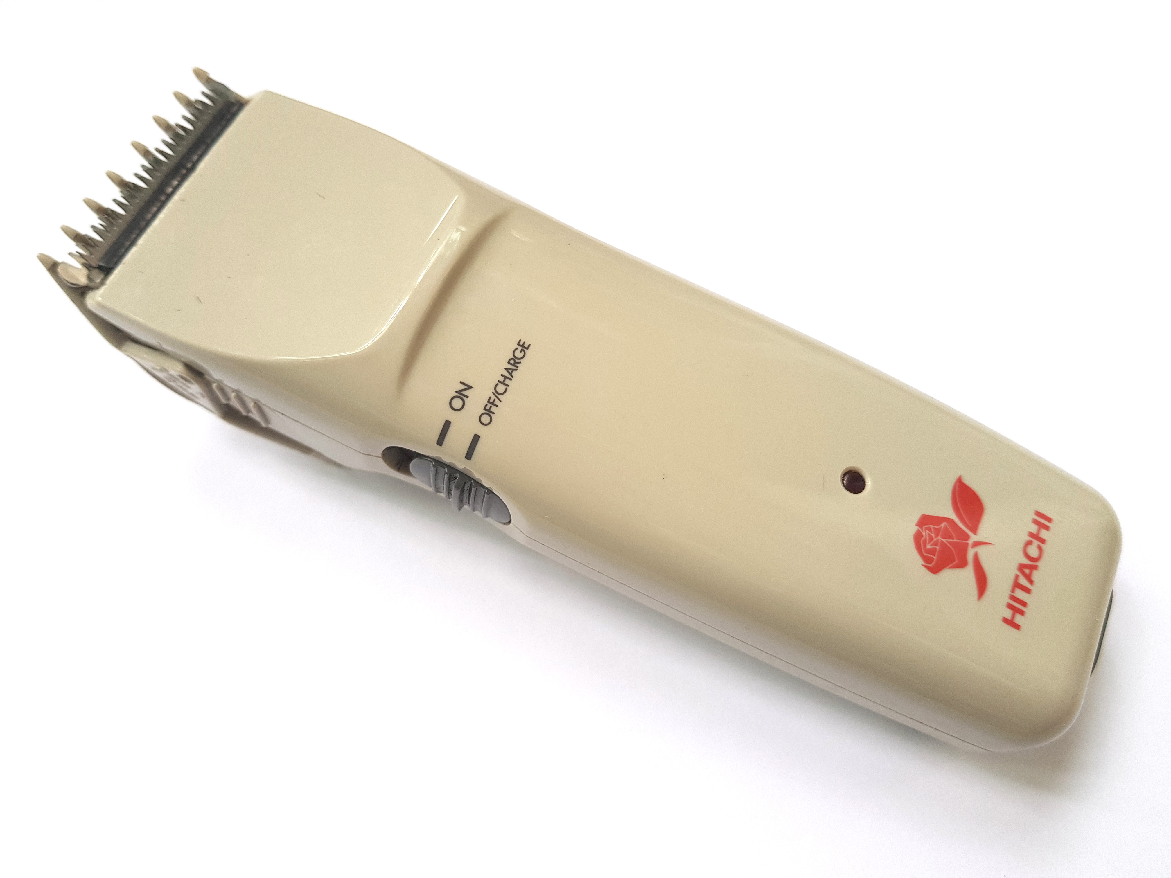 HITACHI CL-8300 이발기